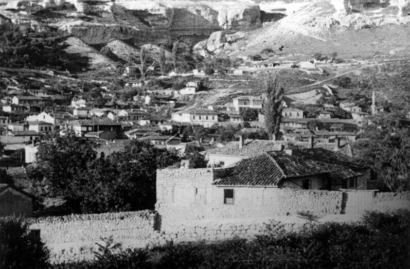 45., Bachtschissarai 16.6.43